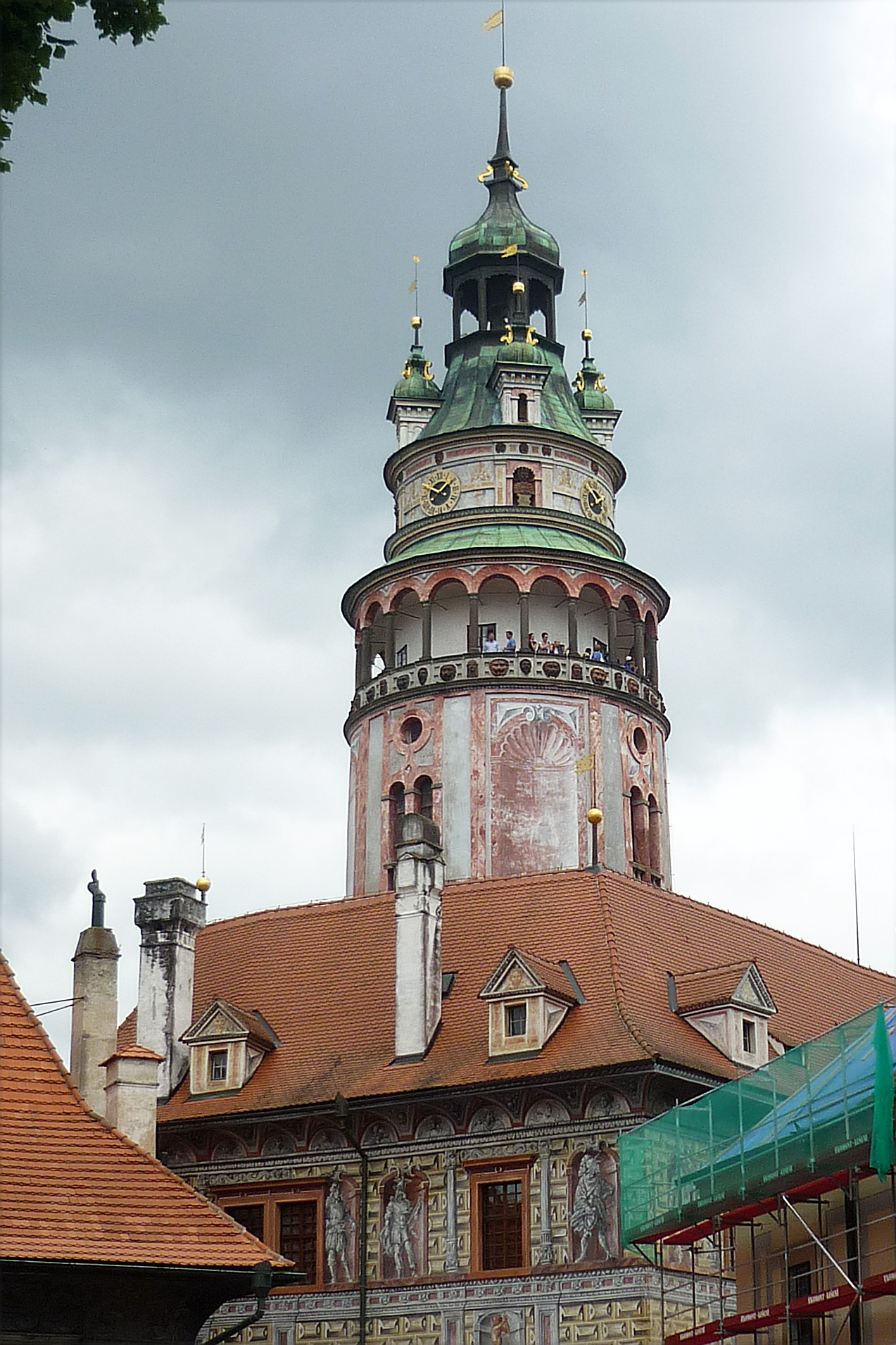 Schlossturm in Böhmisch Krumau (Český Krumlov) in Südböhmen